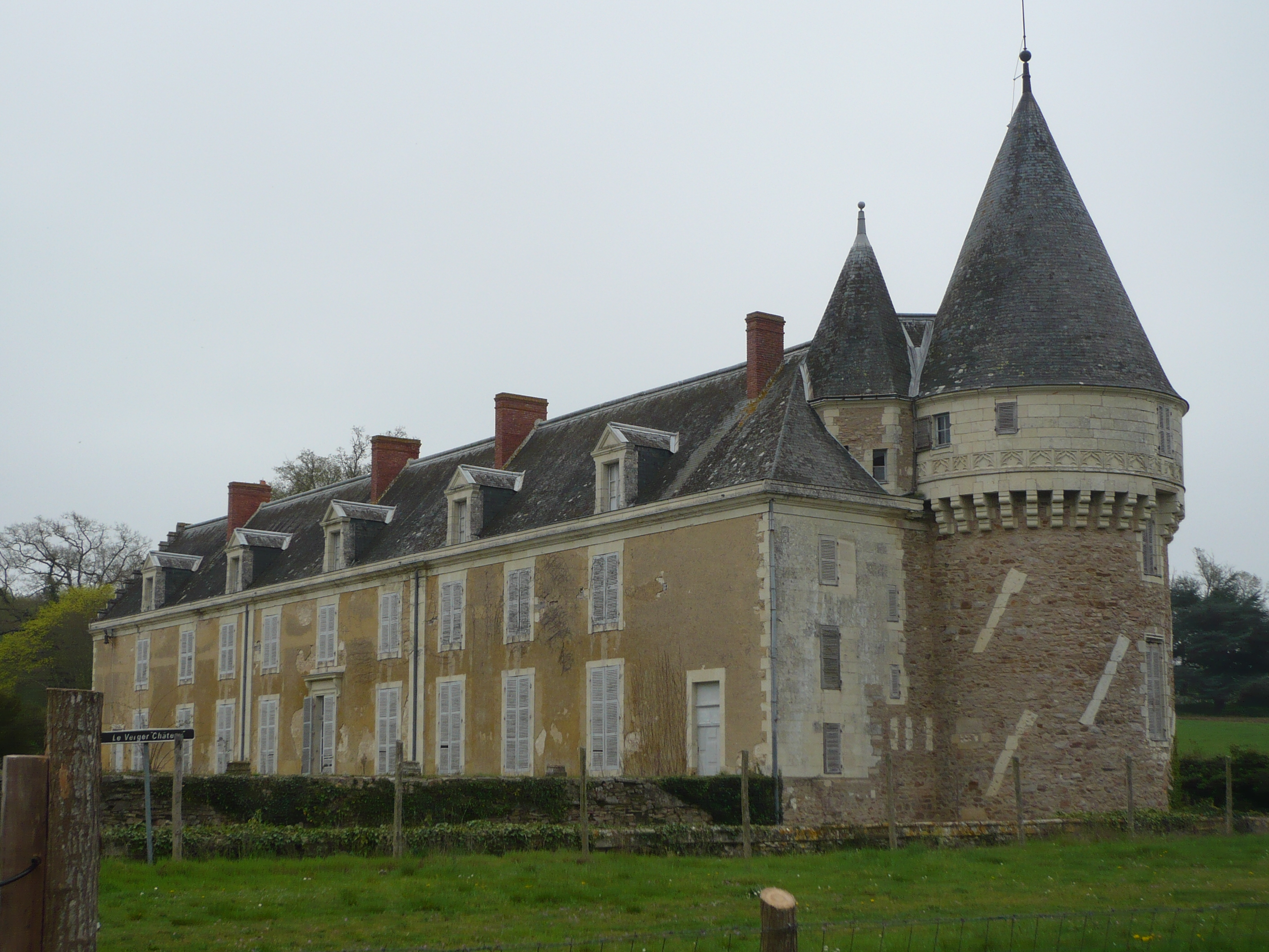 Seiches sur Loir - Château du Verger .